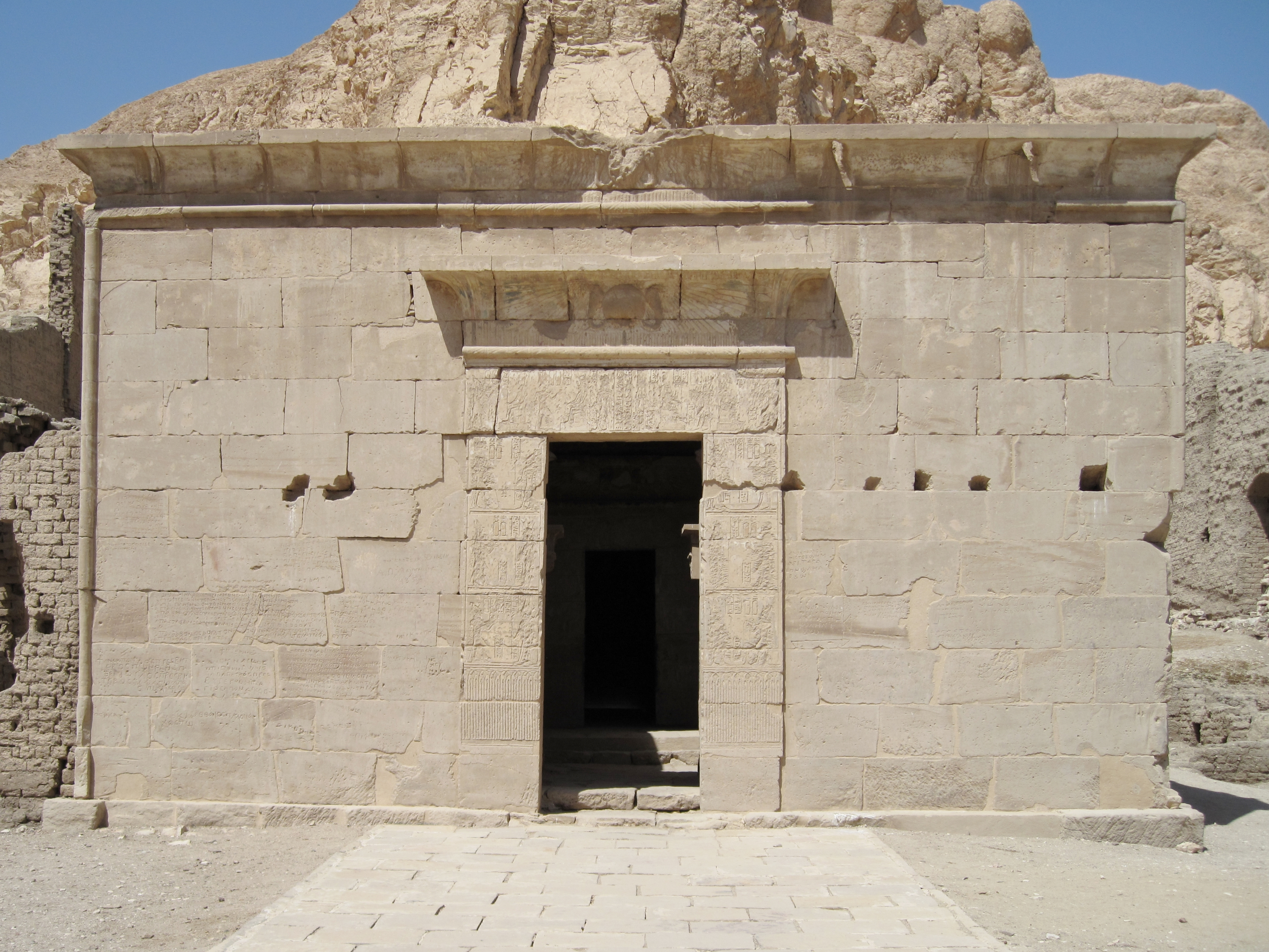 Hathor-Tempel von Deir el-Medina („Kloster der Stadt“), altägyptisch Set Maat („Platz der Wahrheit“), in Theben-West bei Luxor, Ägypten